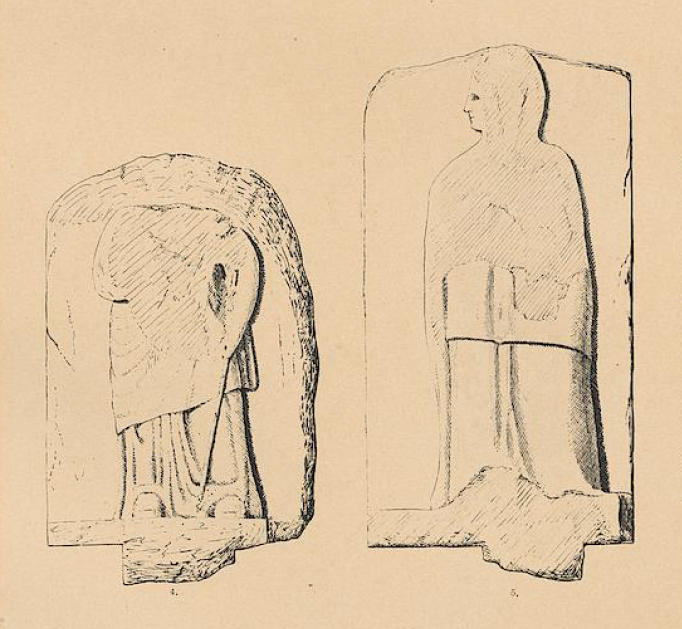 Reliefs von weiblichen Ahnen aus der Ahnengalerie am Nemrut Dağı, Türkei, Westterrasse. Links wahrscheinlich Königin Isias Philostorgos, rechts Laodike, Zeichnung von Carl Humann, 1890